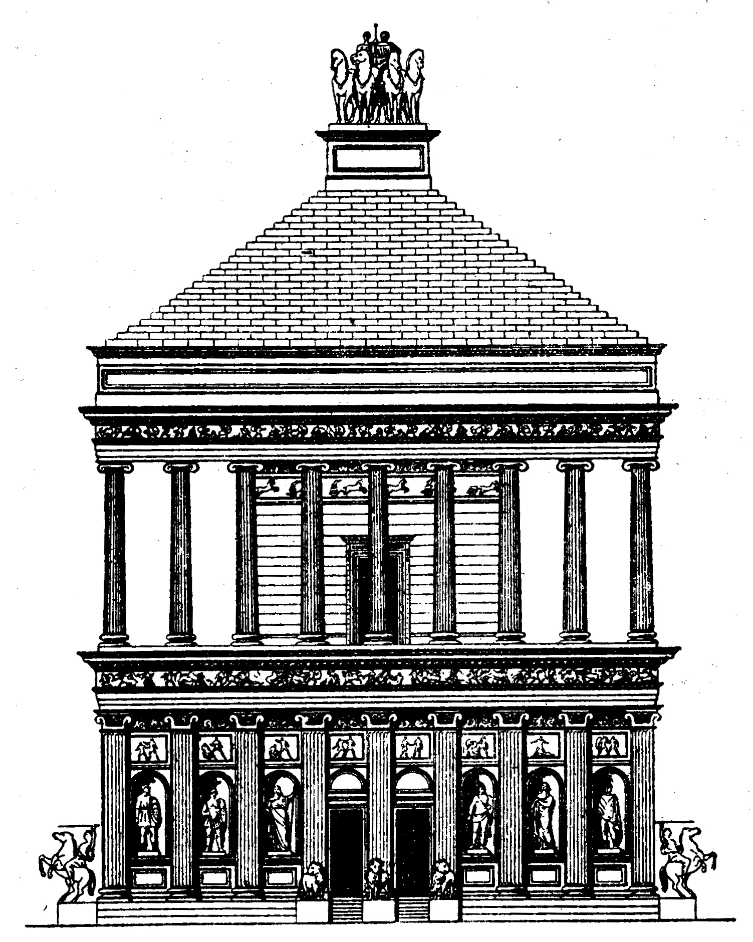 billede fra Salmonsens konversationsleksikon af Mausoleet i Halikarnassos - En sandsynlig gengivelse af Mausoleion i Halikarnassos.